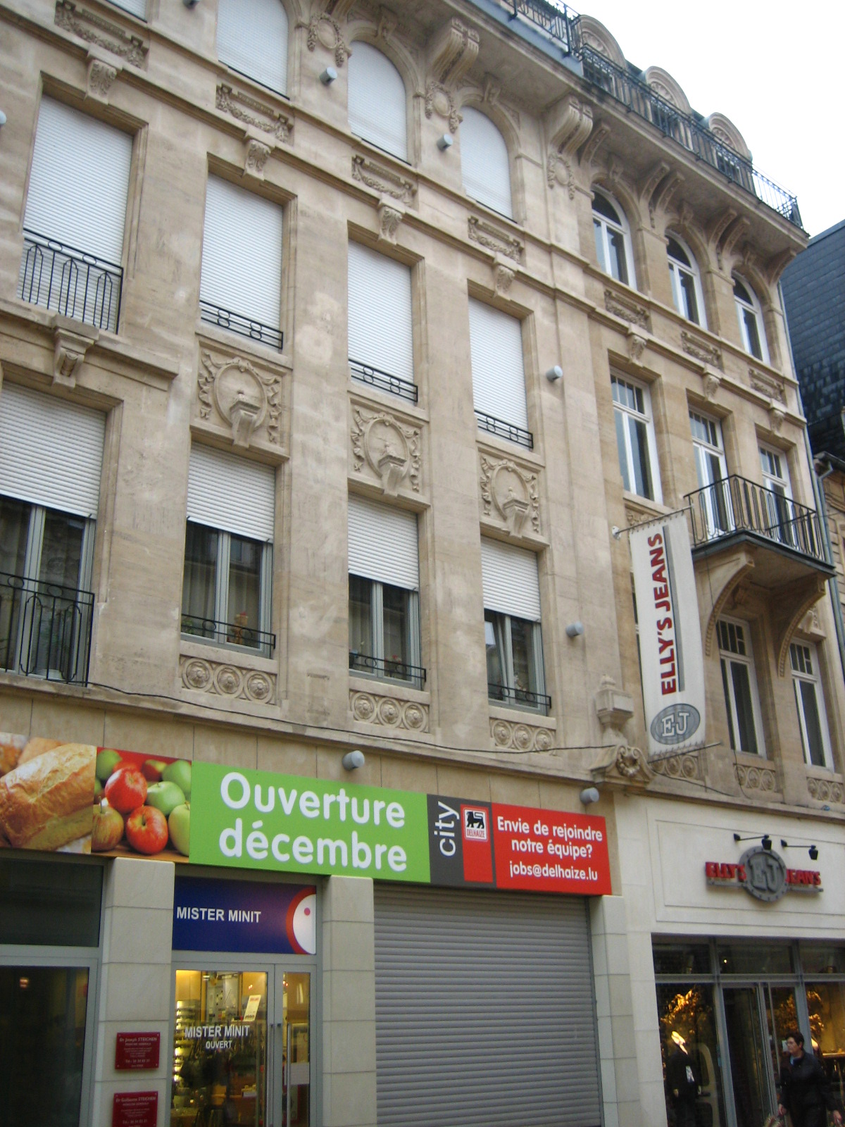 D'Gebai zu Esch-Uelzecht, wou fréier de Kino Métropole dra war, am Dezember 2007.